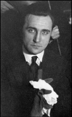 Jacques Rigaut, d’abord mêlé à l’aventure dadaïste, a ensuite fait partie des compagnons de route du surréalisme. Portrait anonyme appartenant au fonds ancien du MNAM G. Pompidou, domaine public. Numérisé par les soins du téléverseur.